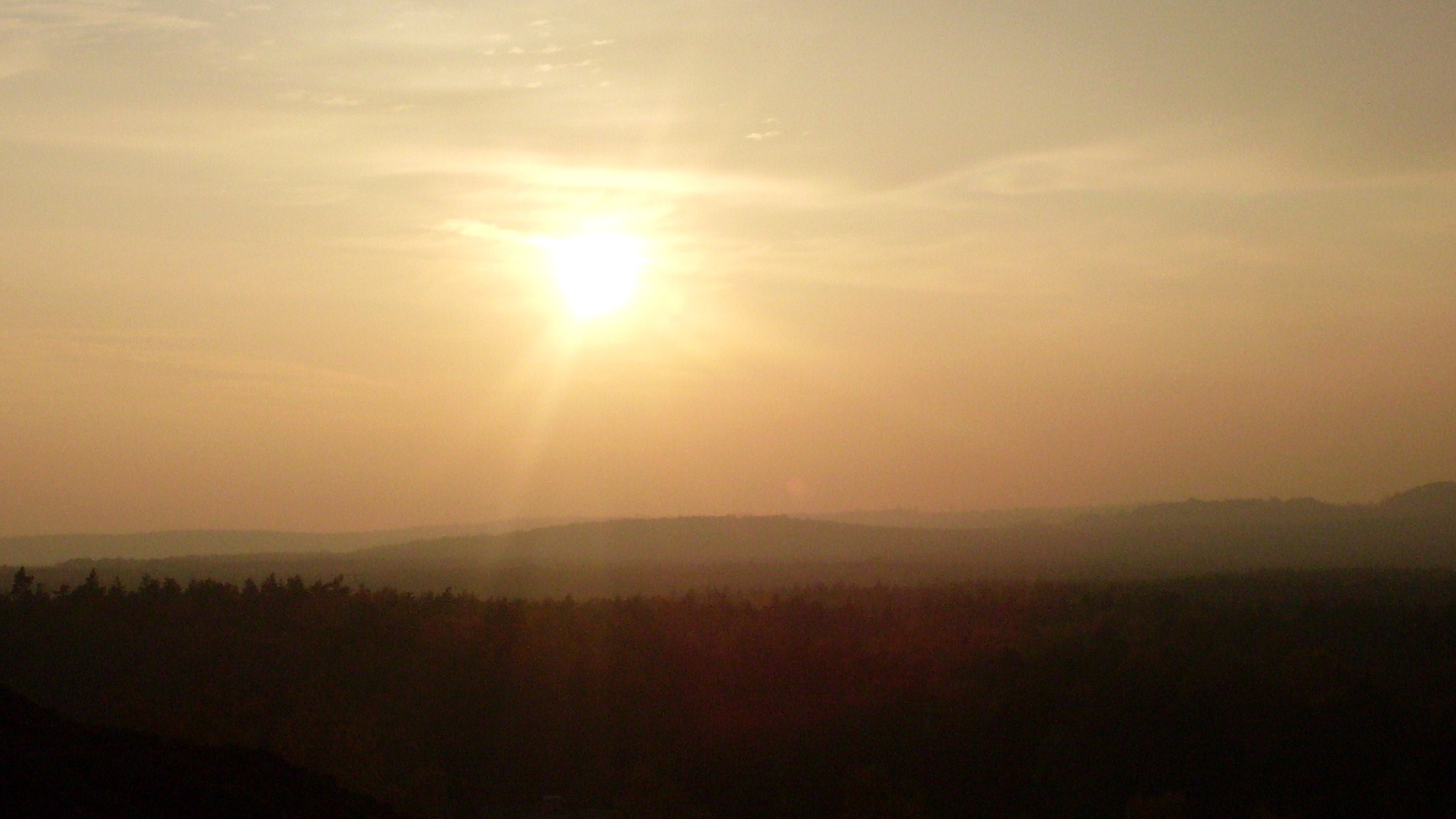 G.Łazy.Las Zwierzyniec